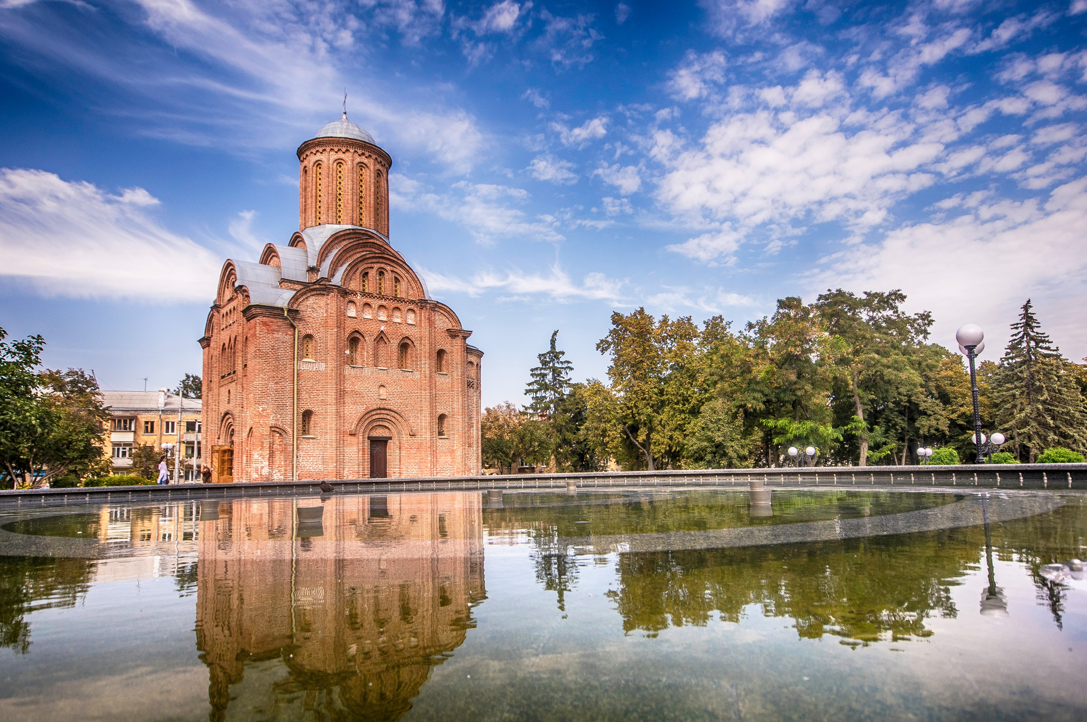 П'ятницька церква (мур.), Чернігів, вул.гетьмана Полуботка, 3